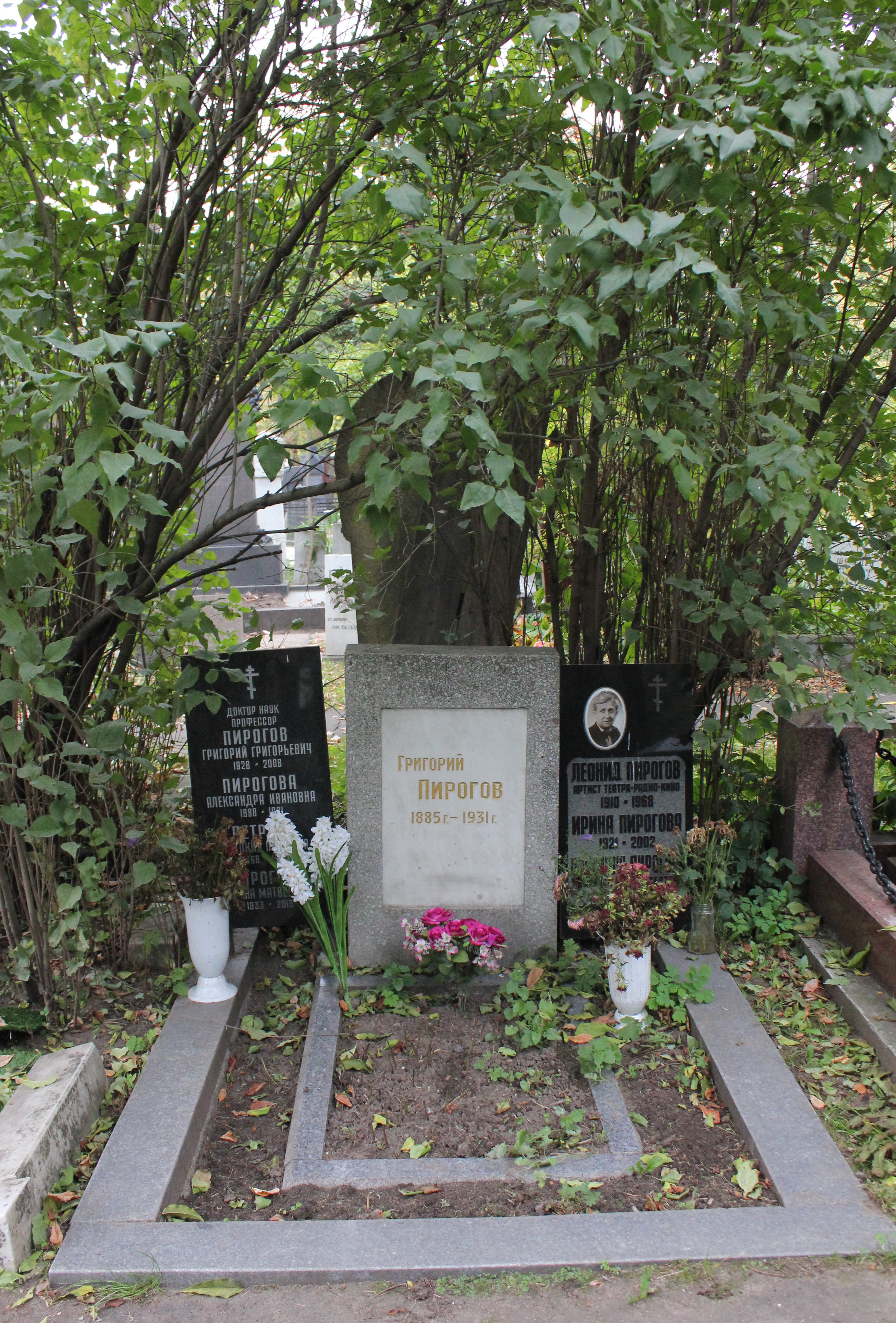 Могила Пирогова Григория Степановича (1885-1931), оперного певца: Новодевичье кладбище, Хамовники, Центральный округ, Москва